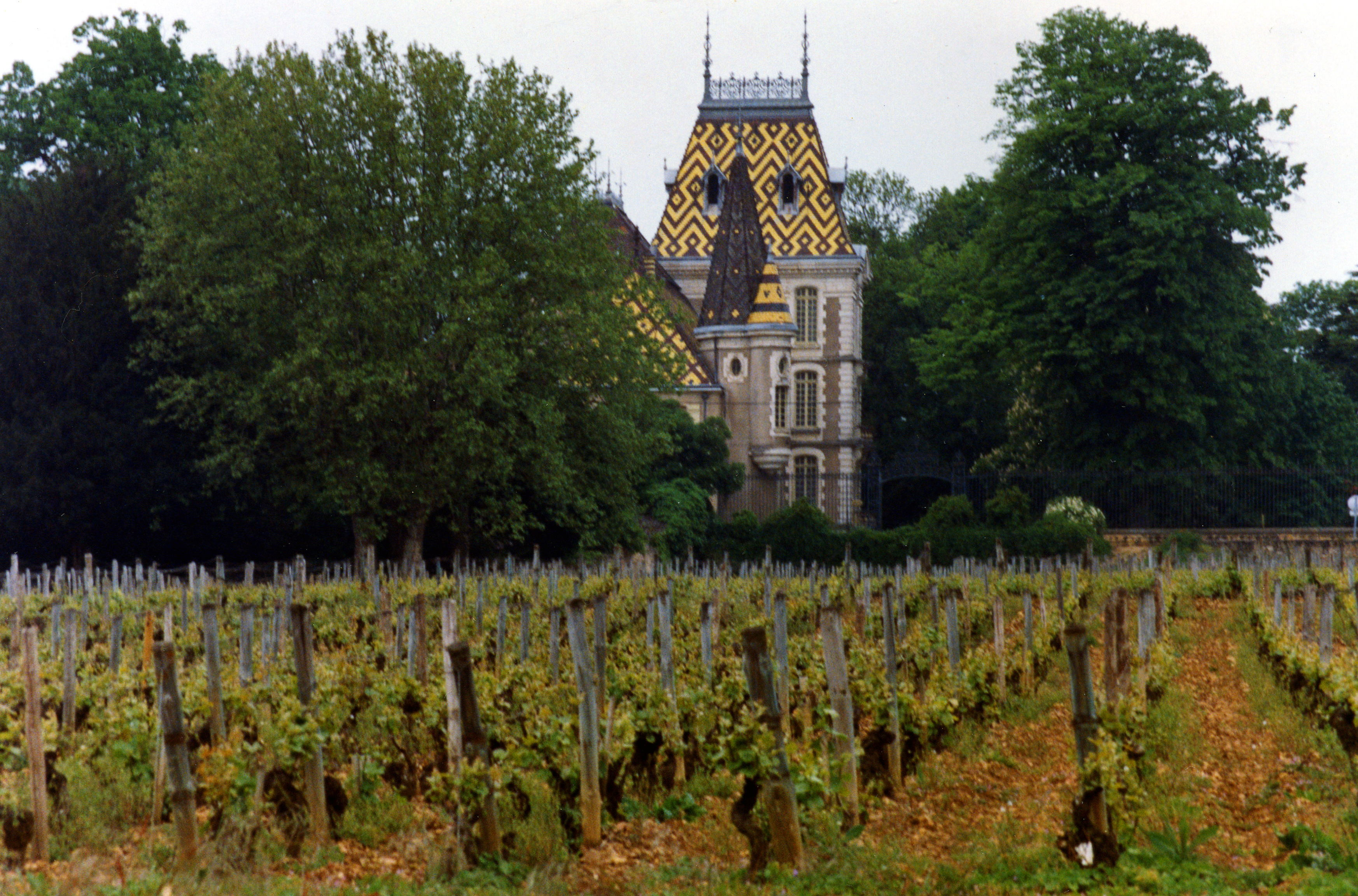 Domaine viticole à Aloxe-Corton (Bourgogne, France)